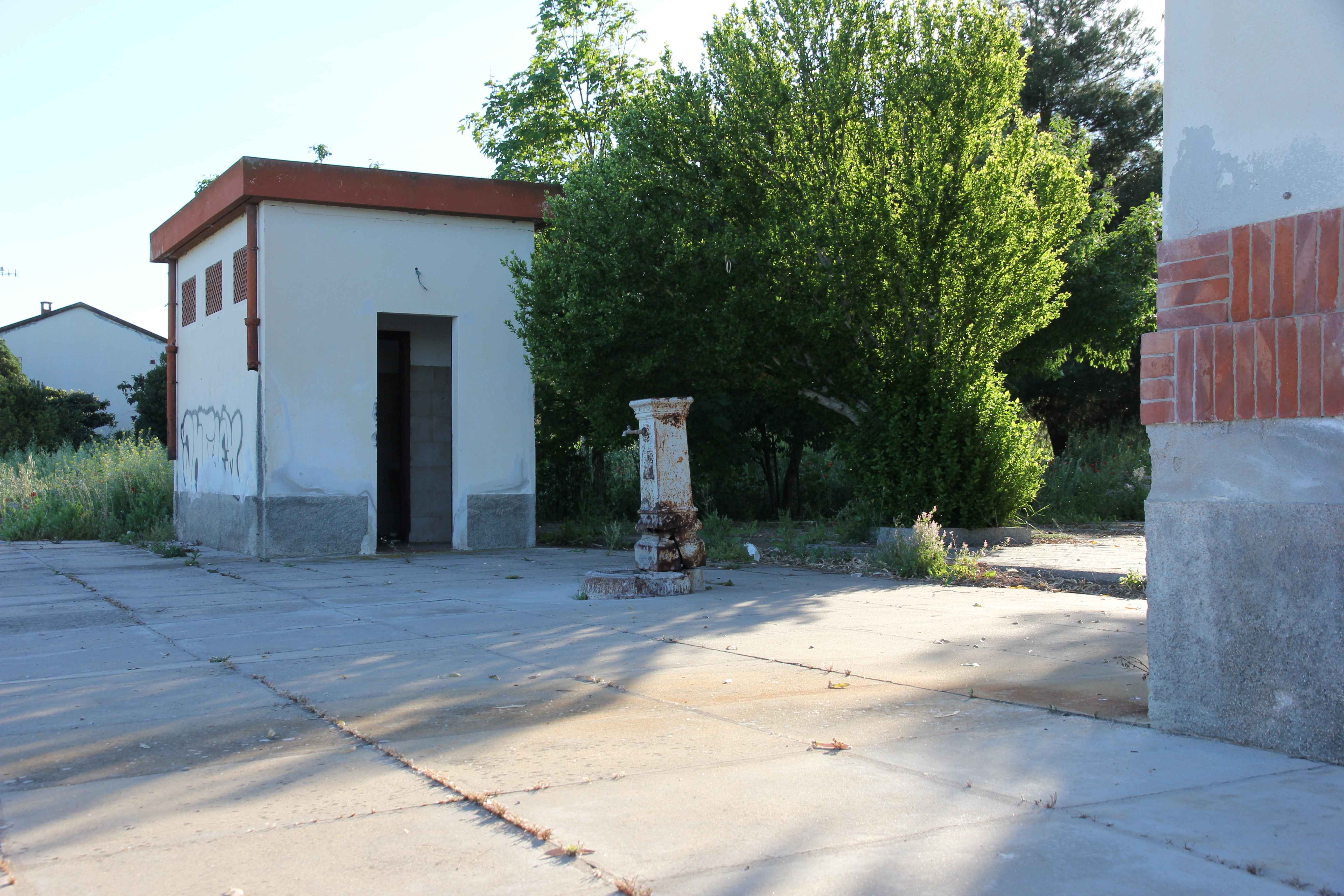 Laerru - Stazione ferroviaria